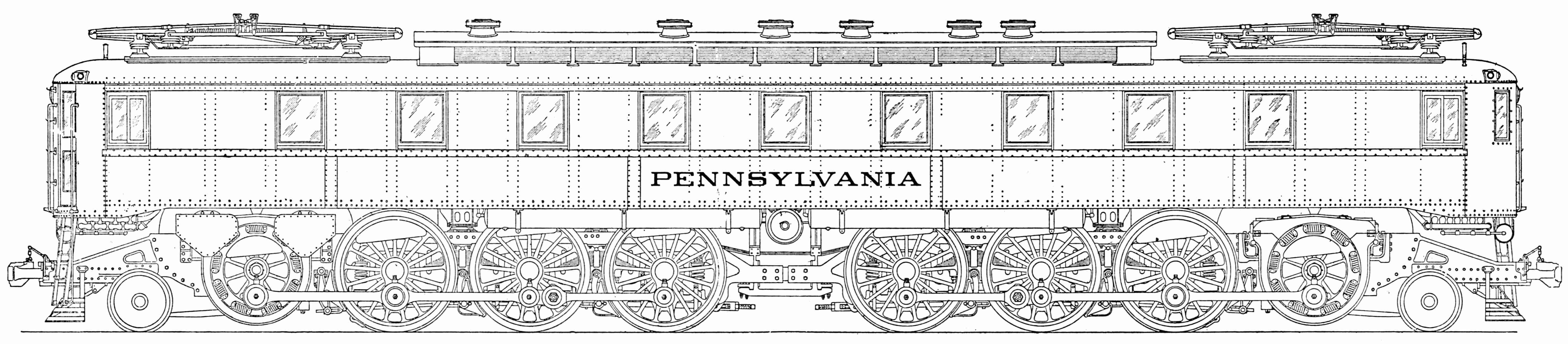 PRR FF1 side view diagram.